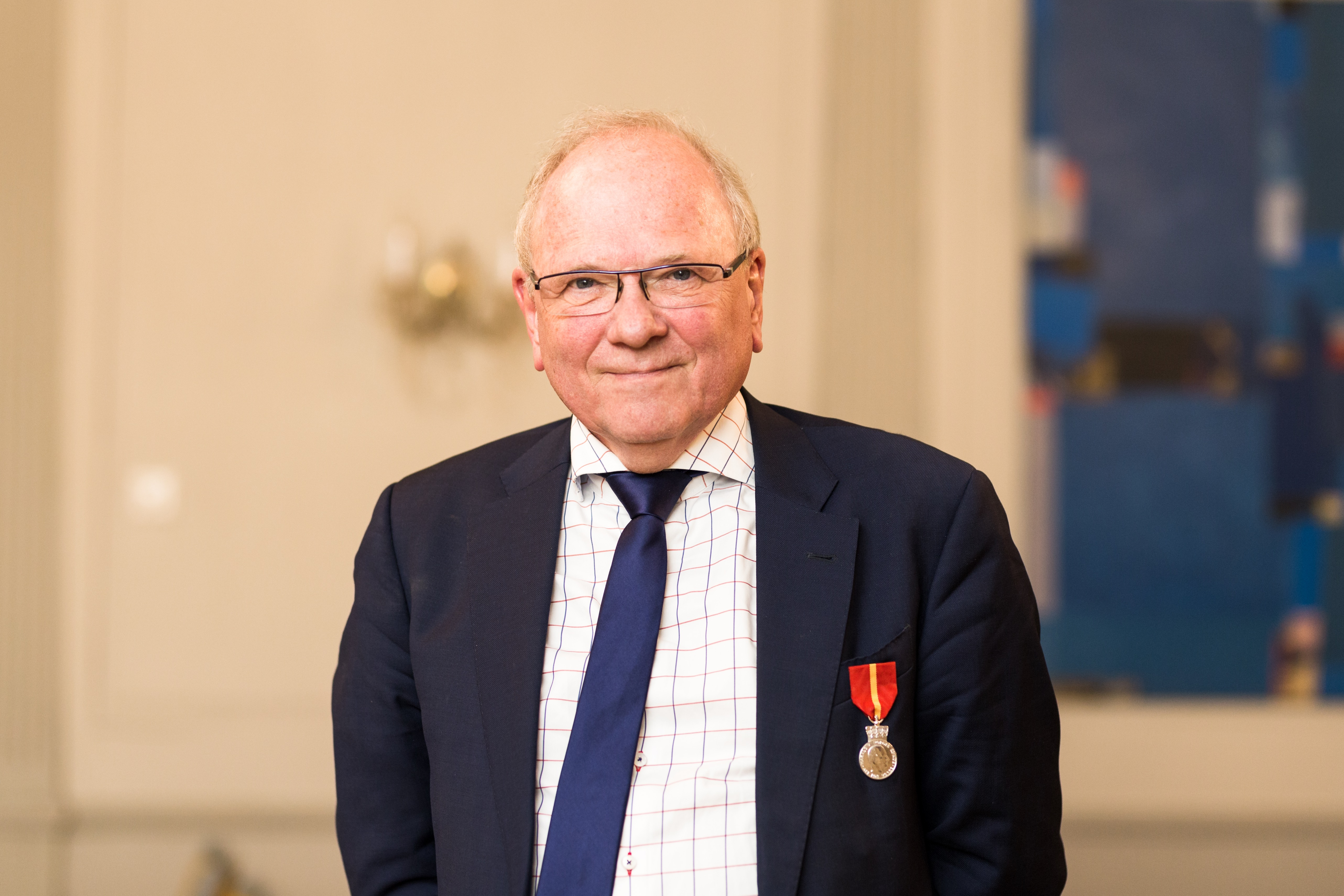 NTNUs tidligere studiesjef Inge Fottland under høytideligheten der han ble tildelt Kongens fortjenstmedalje, primært for sin innsats i prosjektet RIT 2000, som førte frem til St. Olavs Hospital.